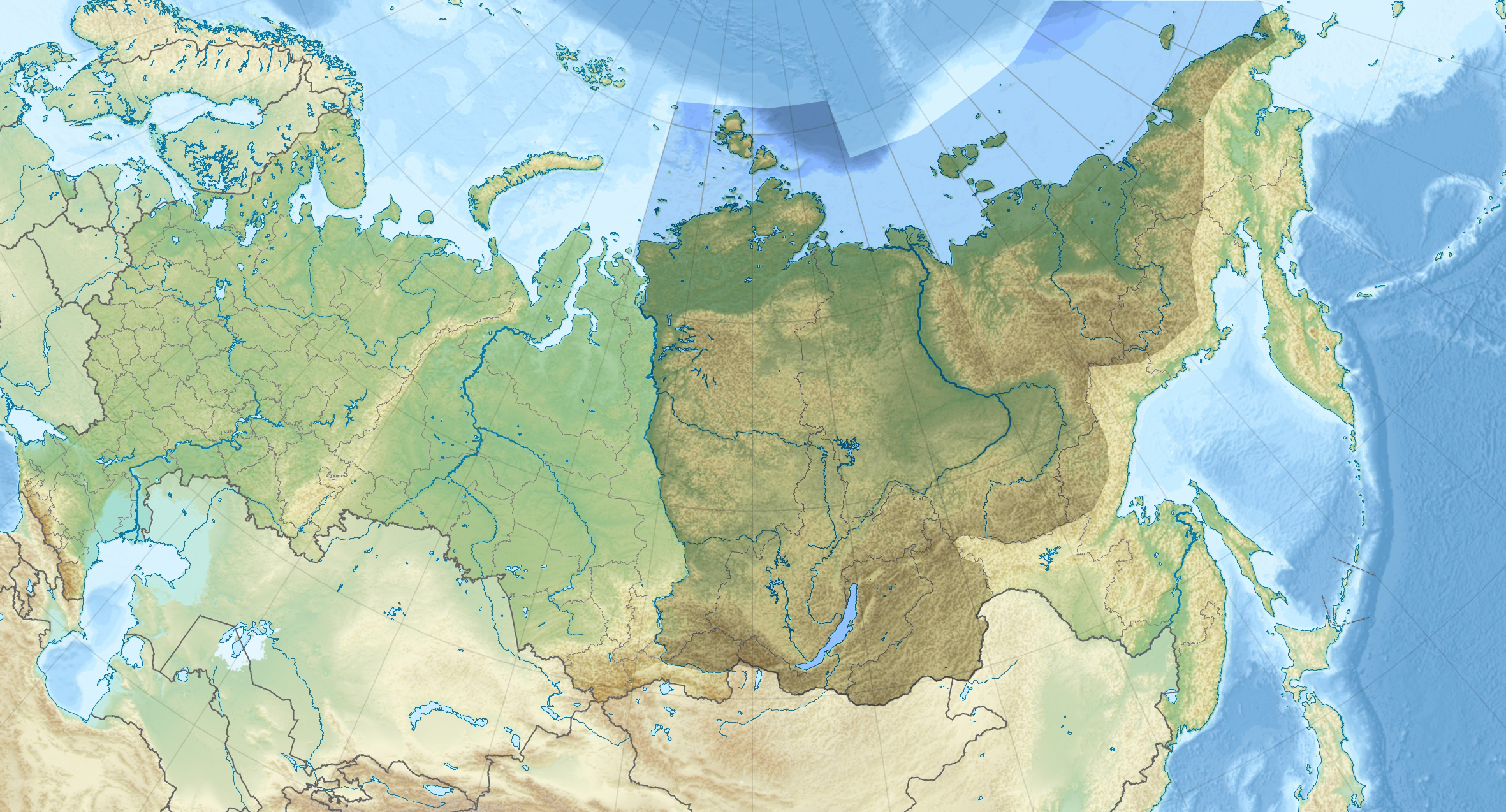 Austrumsibīrija Krievijas kartē